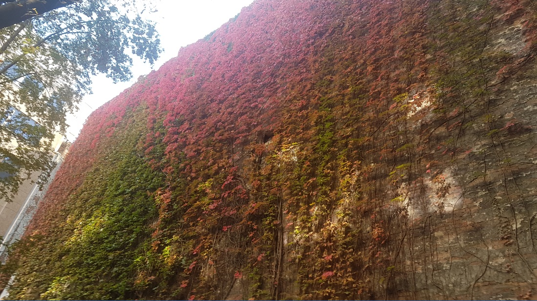 Winobluszcz na ścianie kamienicy przy ul. Marszałkowskiej 66. Podwórze przynależy do bloku mieszkalnego pod nr 68/70.